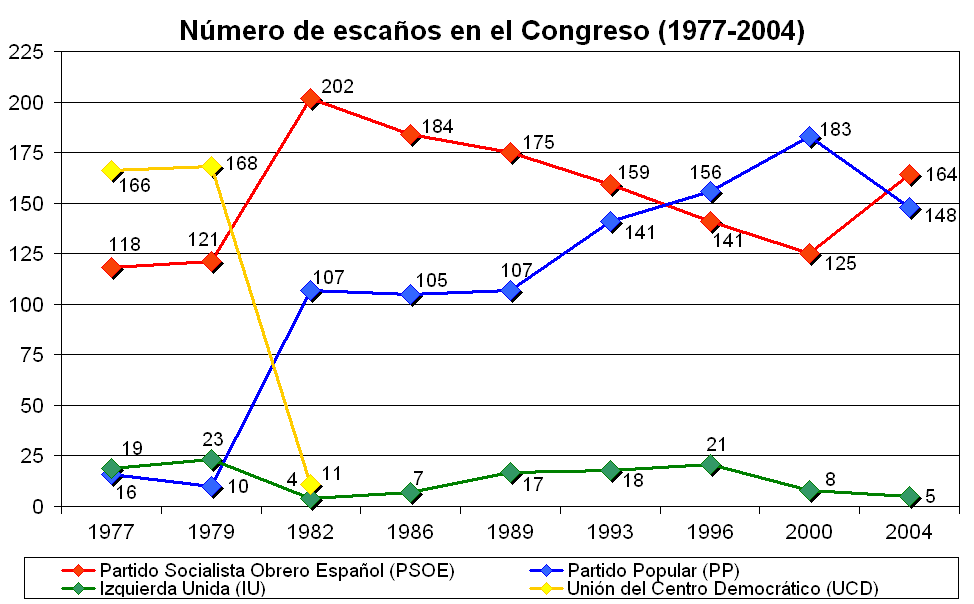 Gráfico del número de escaños de PSOE, PP, IU y UCD en el Congreso de los Diputados de España (1977-2004). Notas: El actual Partido Popular (PP) se presentó en las elecciones de 1977 como Alianza Popular, en las de 1979 como Coalición Democrática, en las de 1982 como Alianza Popular - Partido Demócrata Popular y en las de 1986 como Coalición Popular. En las elecciones de 1977, 1979 y 1982 se cuenta para la gráfica como Izquierda Unida (IU) al Partido Comunista de España, que sería el núcleo de la futura coalición. La Unión del Centro Democrático (UCD) se presentó en las elecciones de 1977, 1979 y 1982, desapareciendo como partido político.